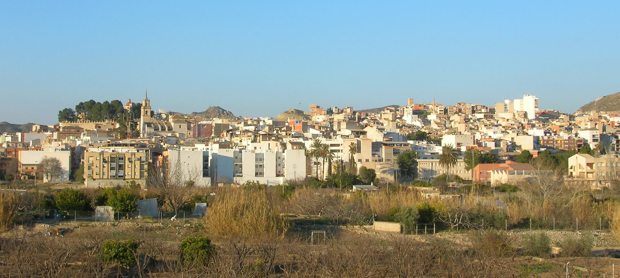 Vista general de Abarán, Murcia, España, desde la carretera de Ojós, febrero de 2006. General view from Abarán, Murcia, Spain. Own picture given to PD.